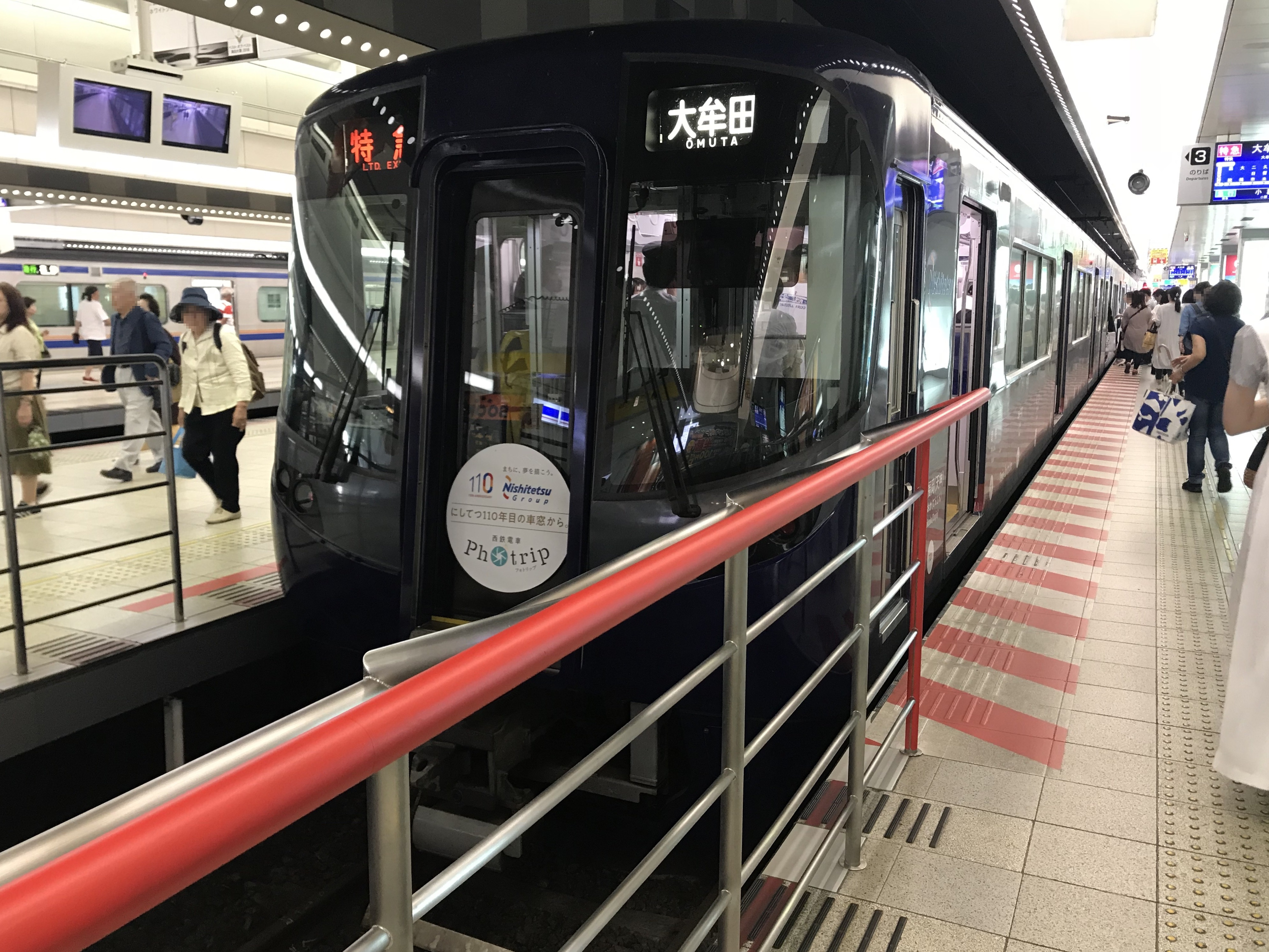 西鉄福岡(天神)駅から発車する前の大牟田行き特急(110周年記念ラッピング車両)